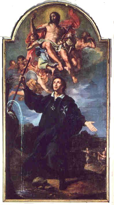 S. Ugo Canefri.label QS:Len,"S. Ugo Canefri."label QS:Lit,"S. Ugo Canefri. Il miracolo della fonte."